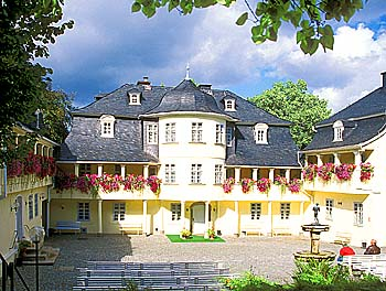 Musikinstrumenten-Museum der Musikstadt Markneukirchen